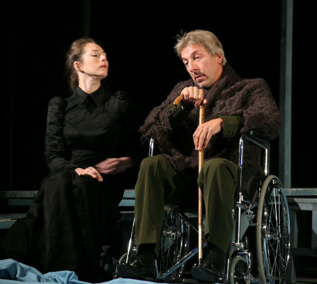 Сцена из спектакля Саратовского академического театра драмы «Чайка». Актёры Татьяна Родионова, Юрий Кудинов.